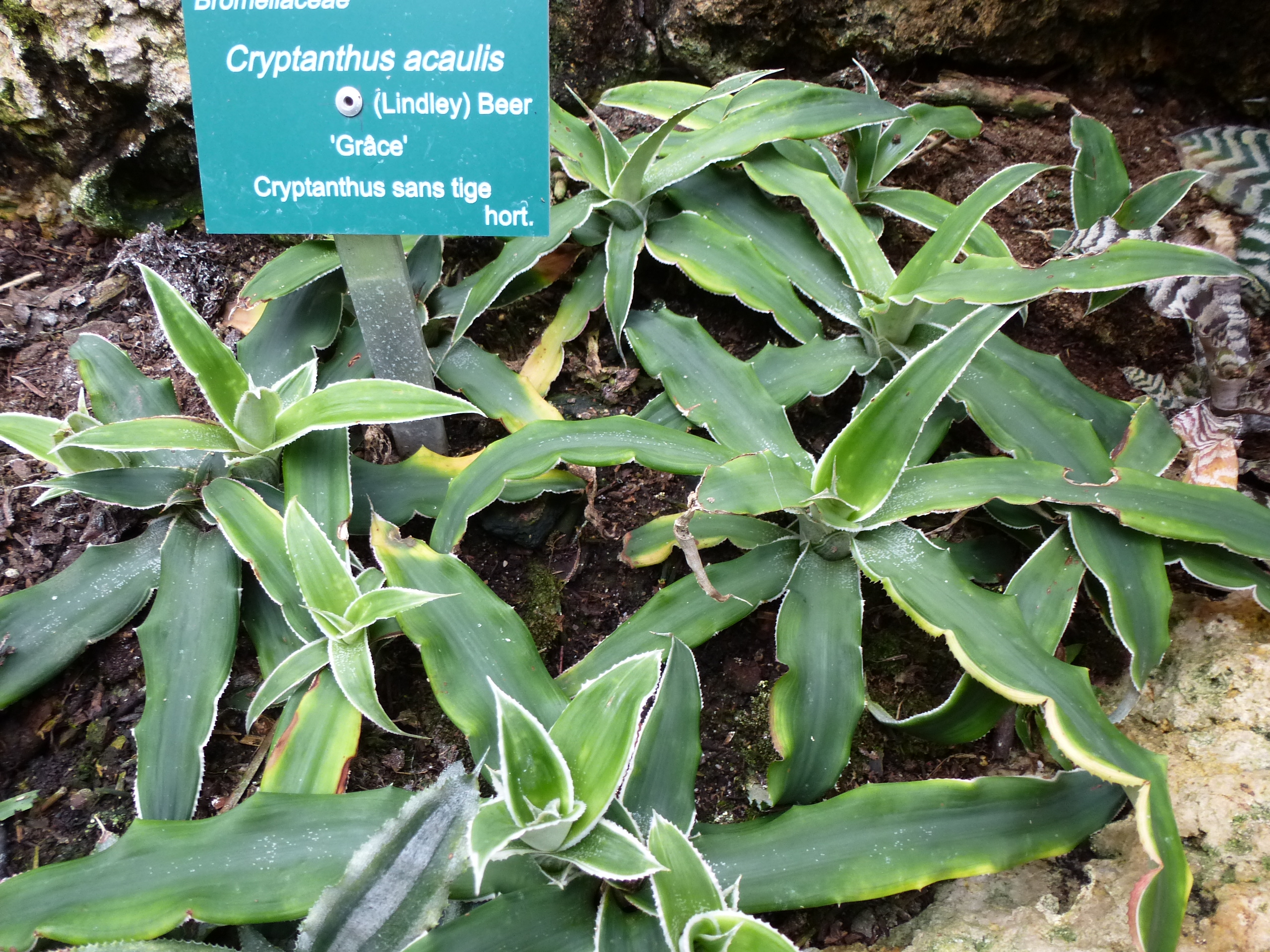 Cryptanthus acaulis 'Grâce' - Serres d'Auteuil - Jardin botanique de la Ville de Paris - France